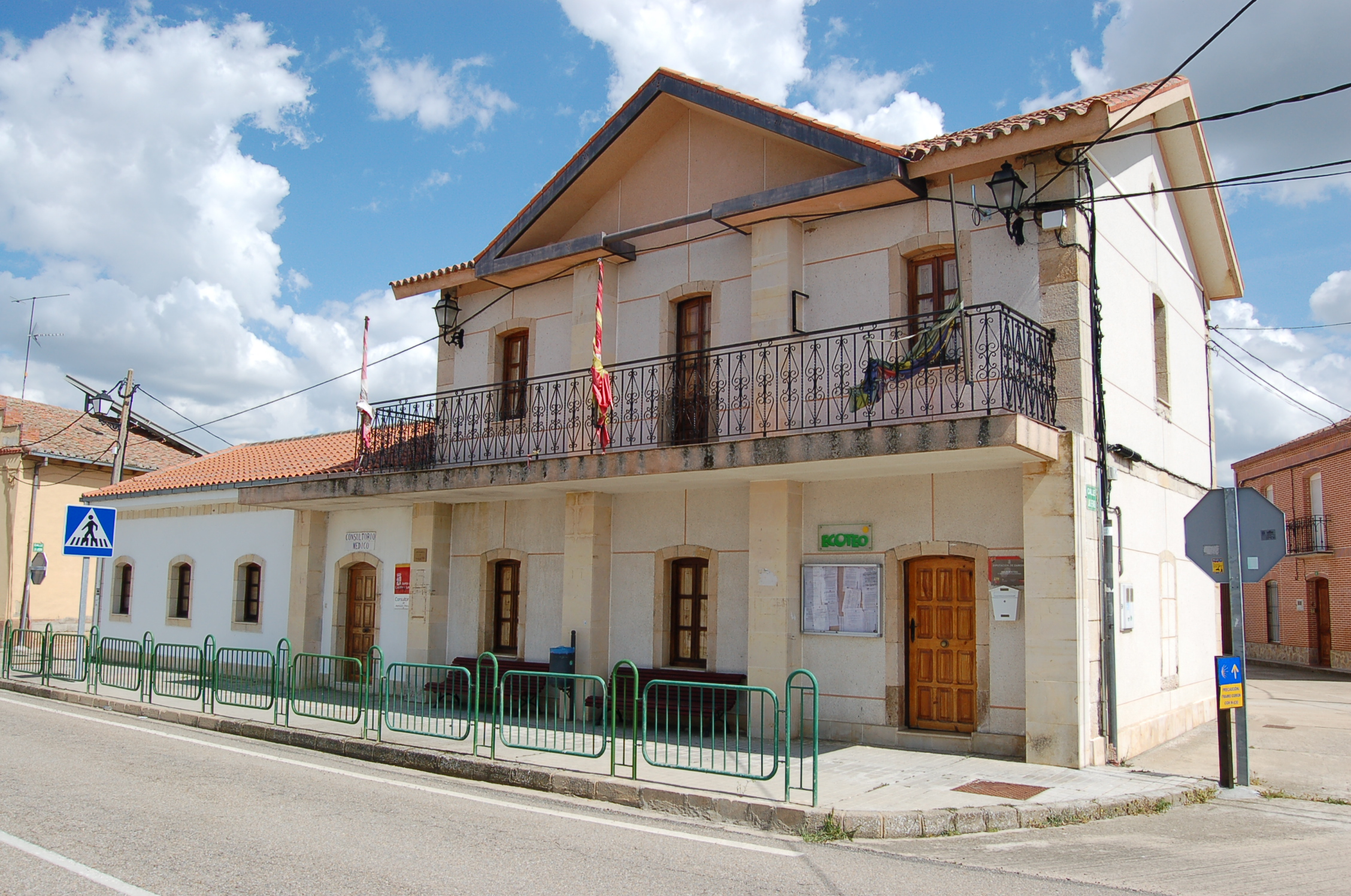 Casa consistorial Barcial del Barco